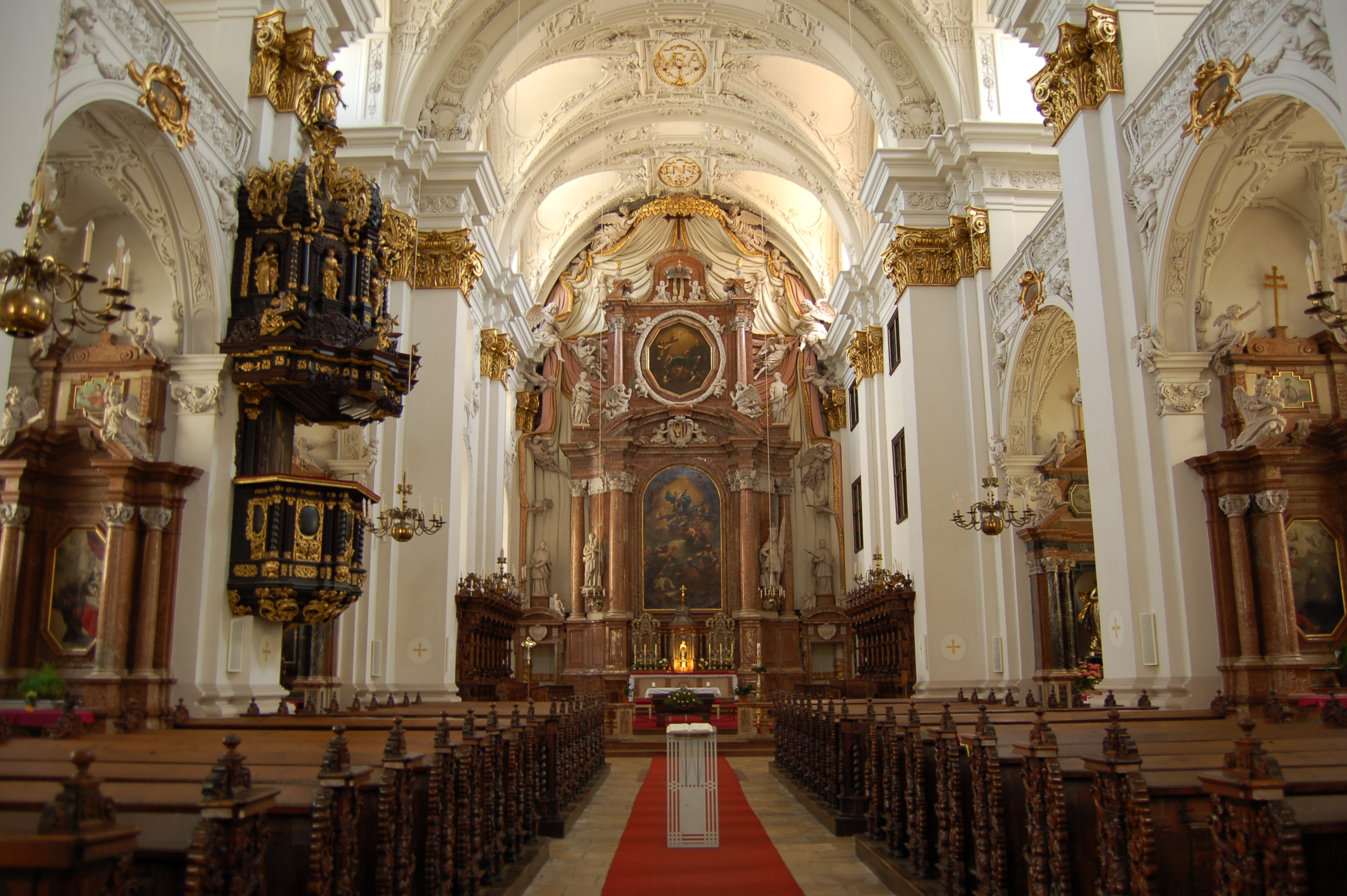 Alter Dom in Linz Innen